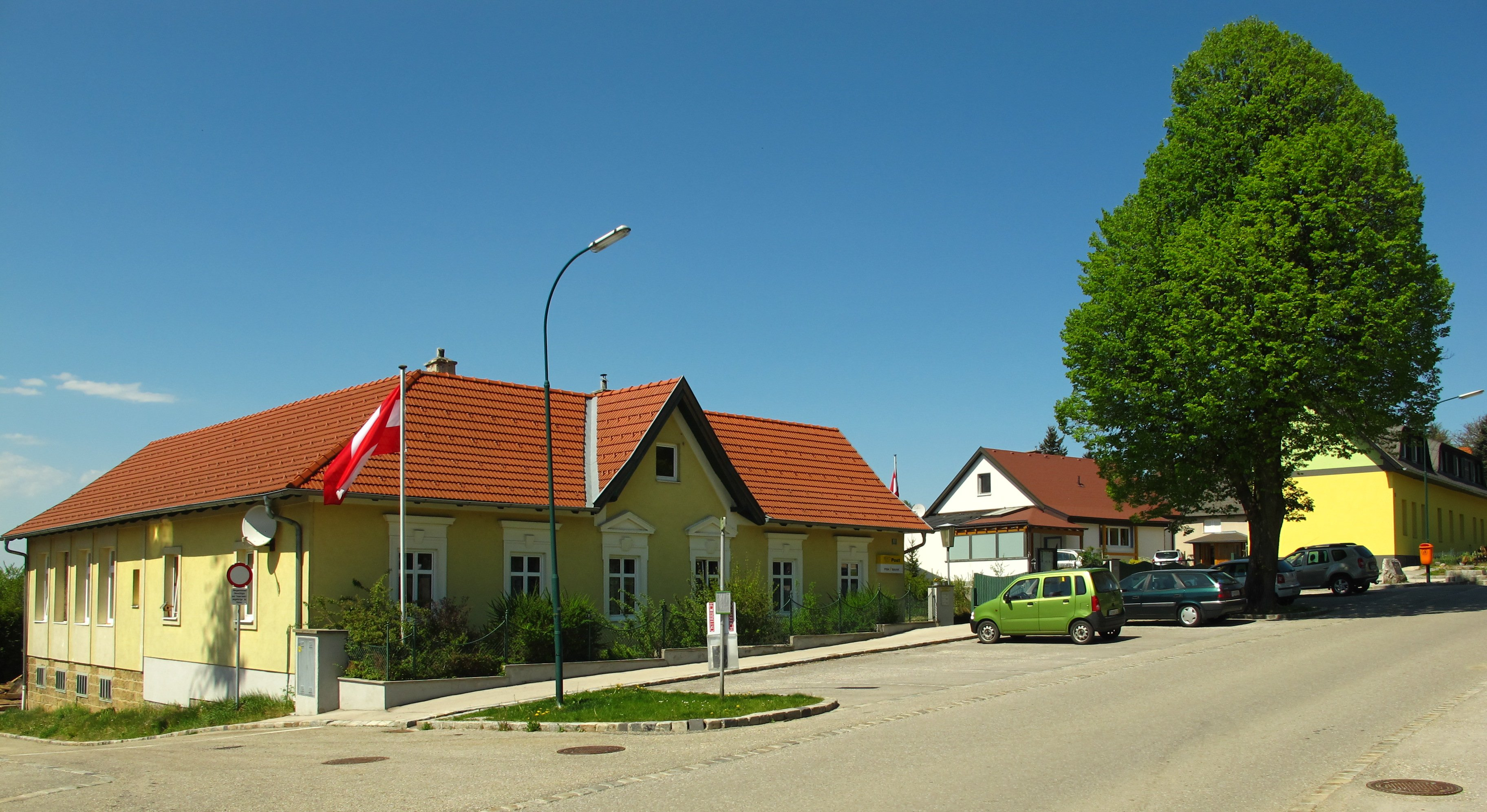 Hintersdorf Hauptplatz